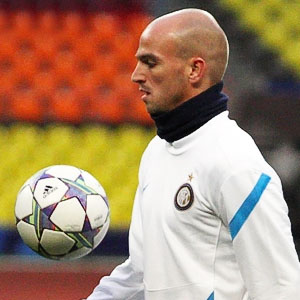 Il giocatore argentino dell'Inter Esteban Cambiasso.